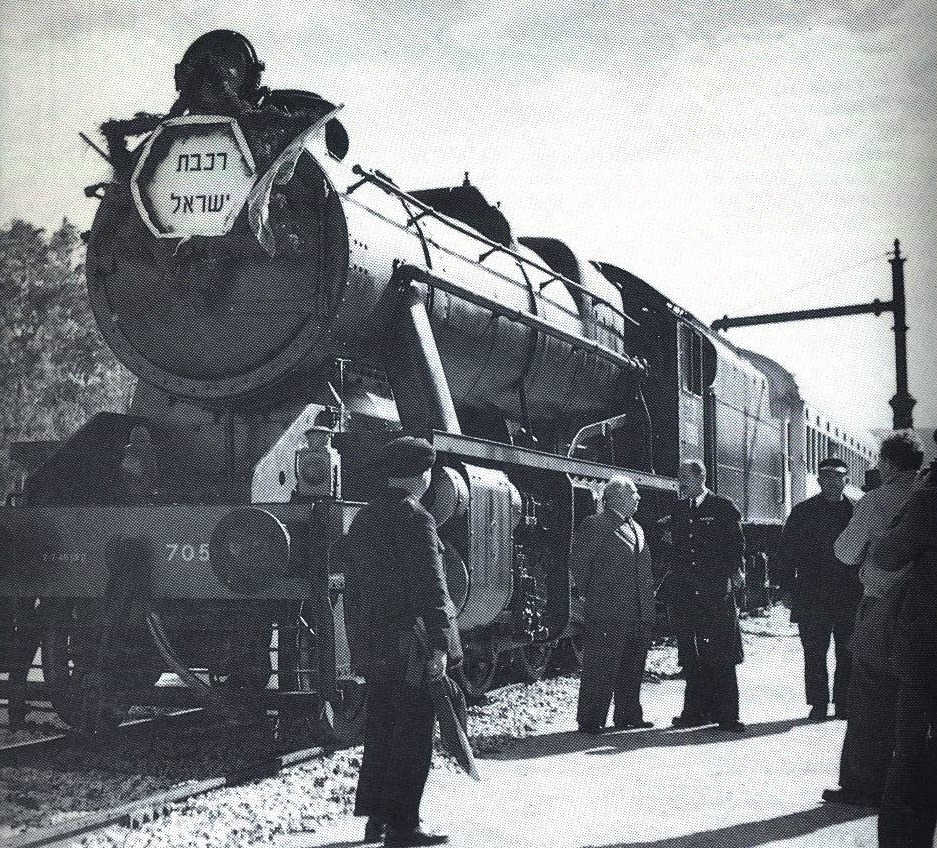 קטר קיטור 70513 ממלא מים בתחנת זכרון יעקב ברכבת הראשונה מחיפה לחדרה בשרות רכבת ישראל.